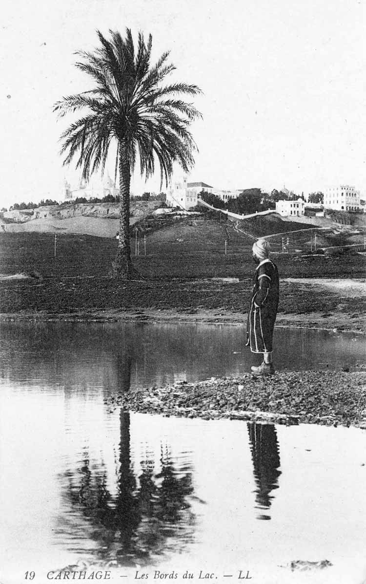 Ports puniques, Carthage, Tunisie